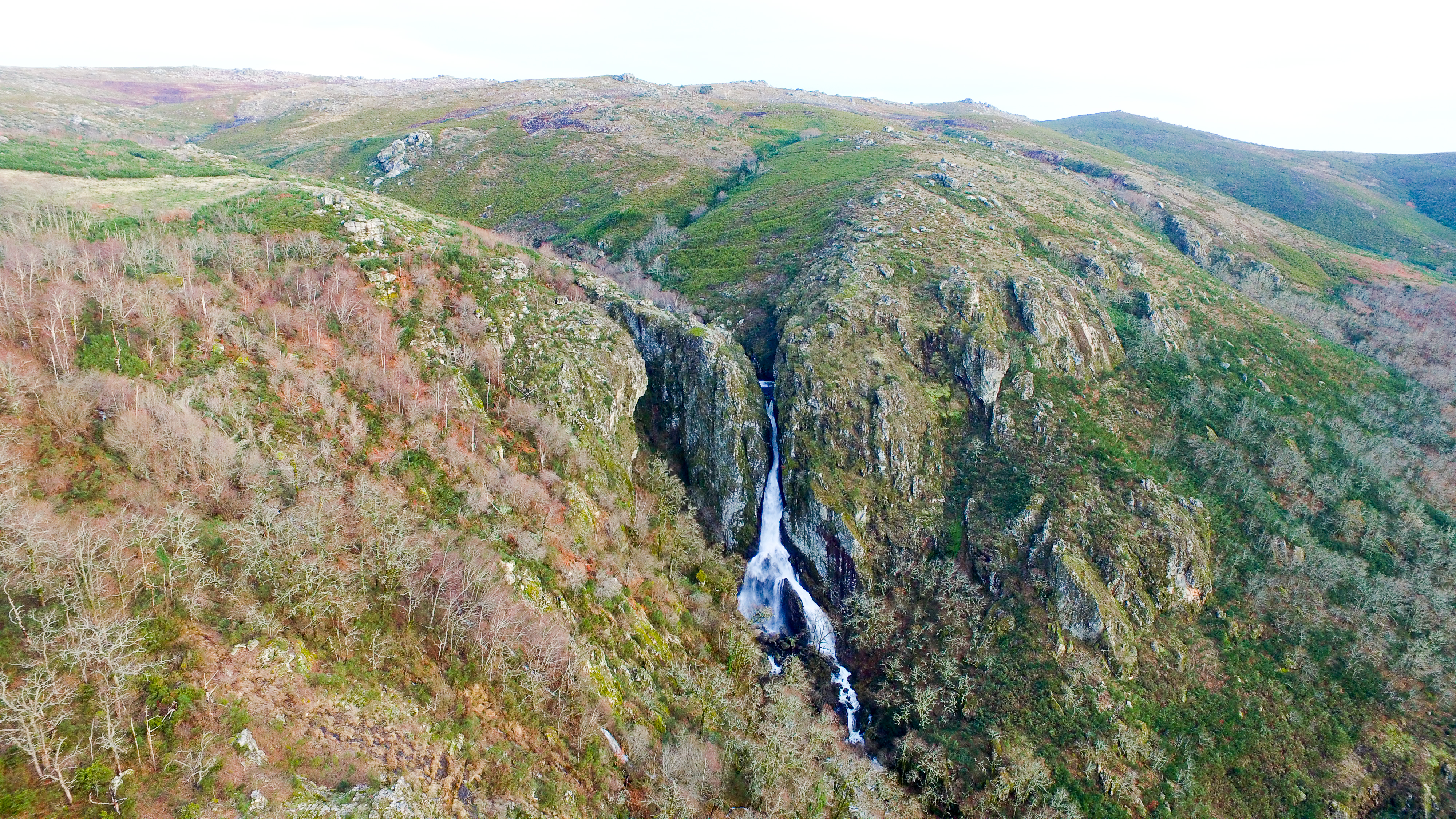 Vista frontal sobre a Cascata de Pitões das Júnias